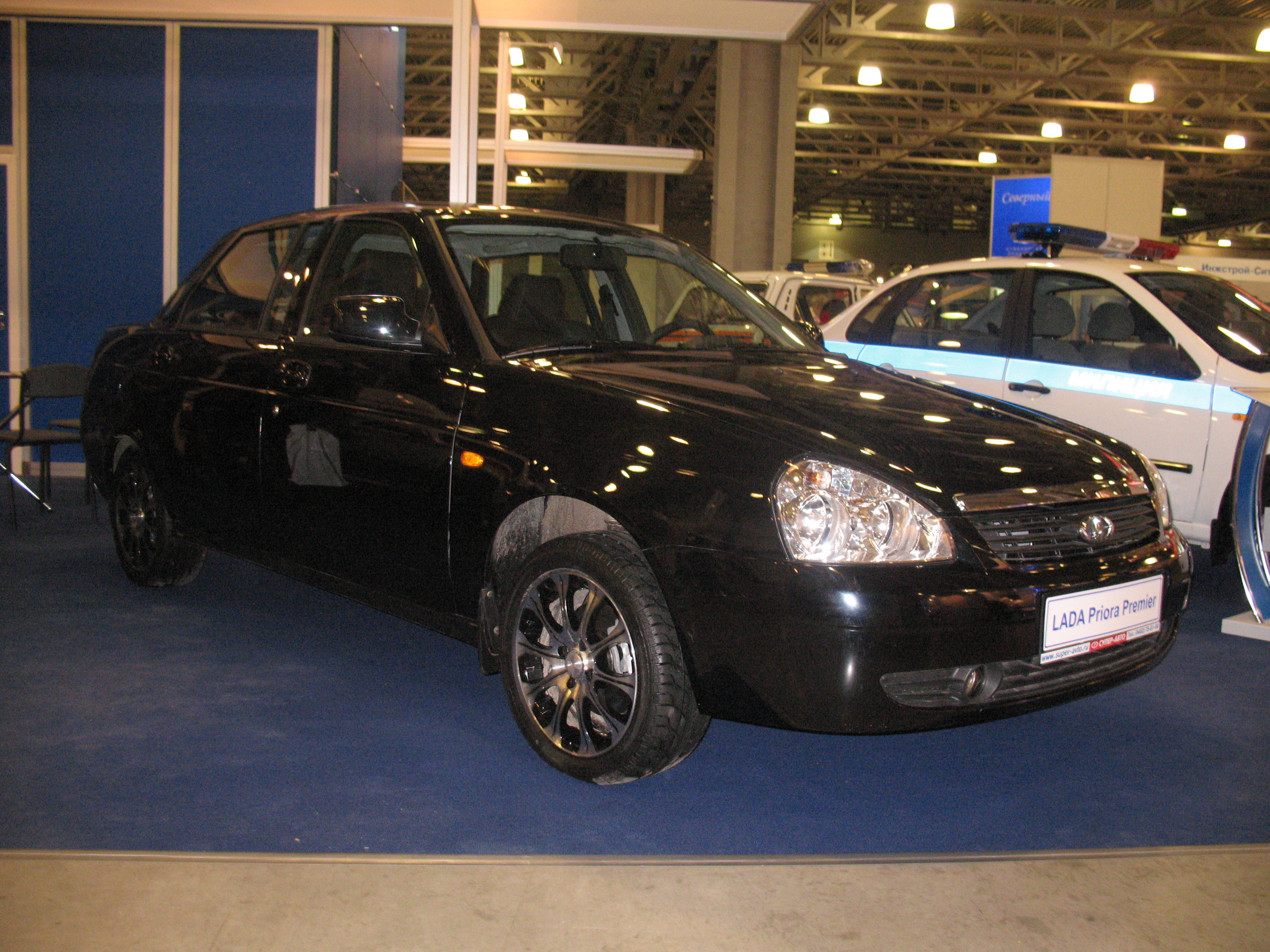 LADA 708 Premier